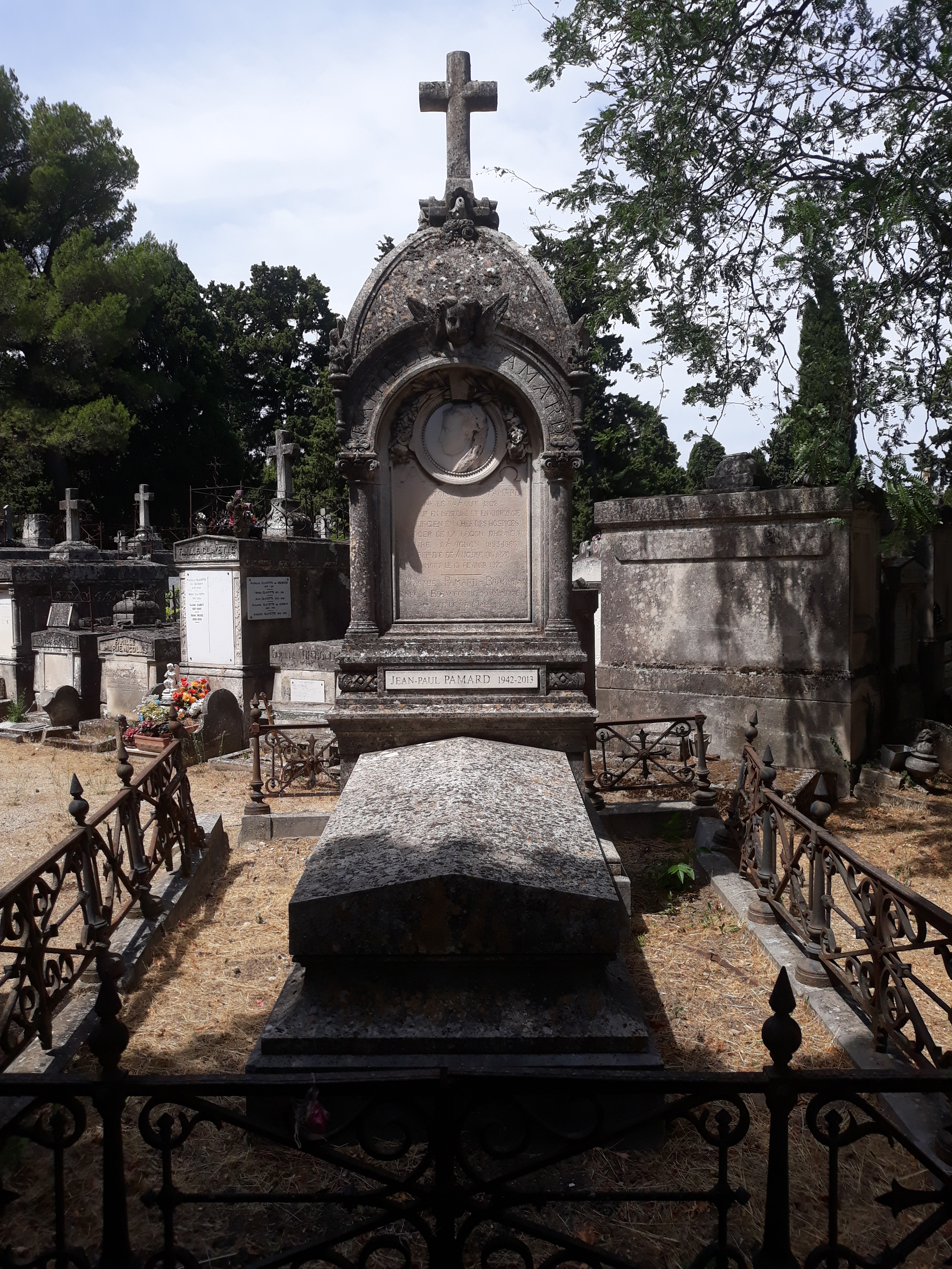 Das Grab des französischen Chirurgen und Politikers Paul Pamard auf dem Cimetière Saint-Véran in Avignon.